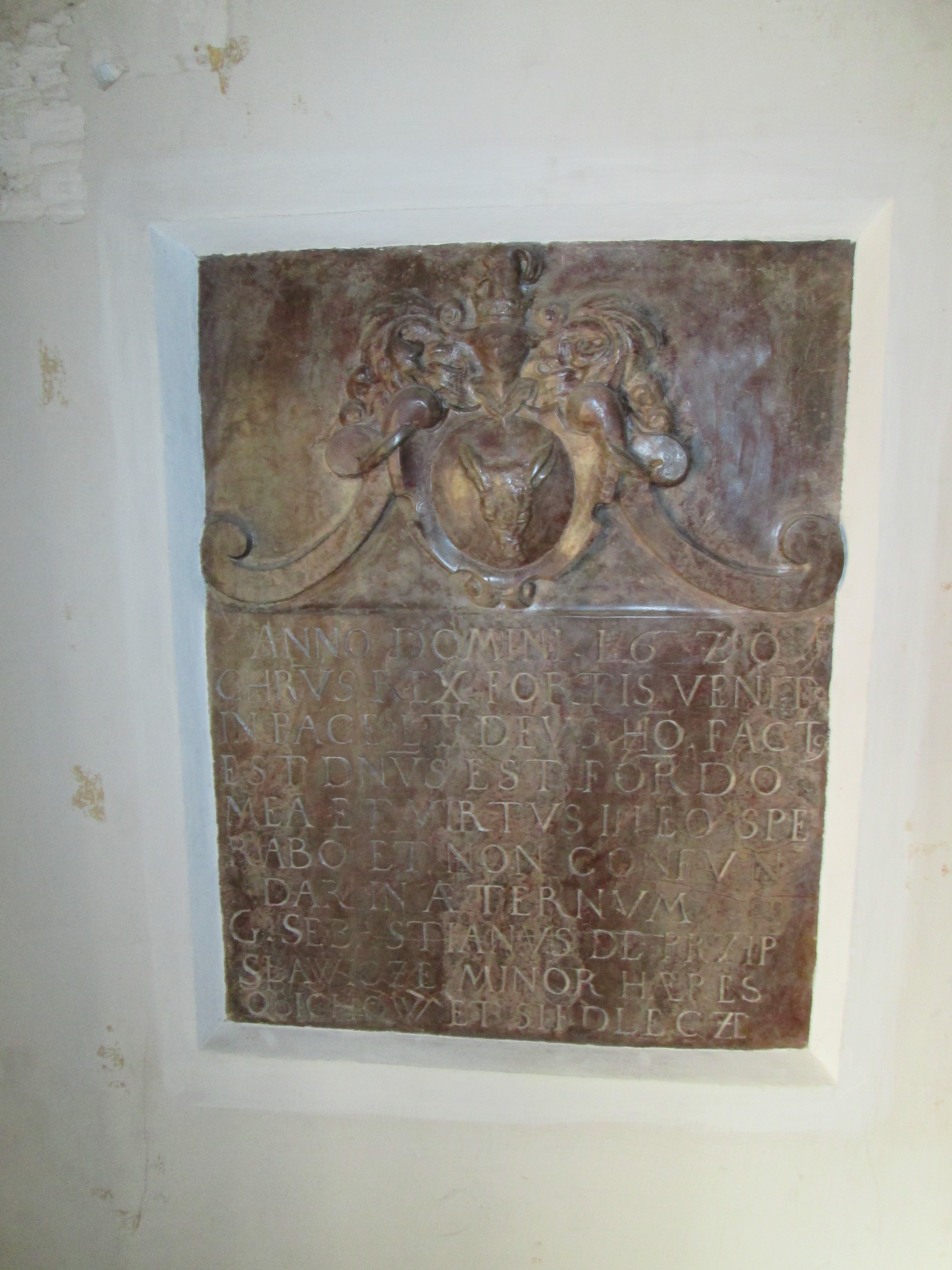 Sosnowiec, Zamek Sielecki, XVII, XIX